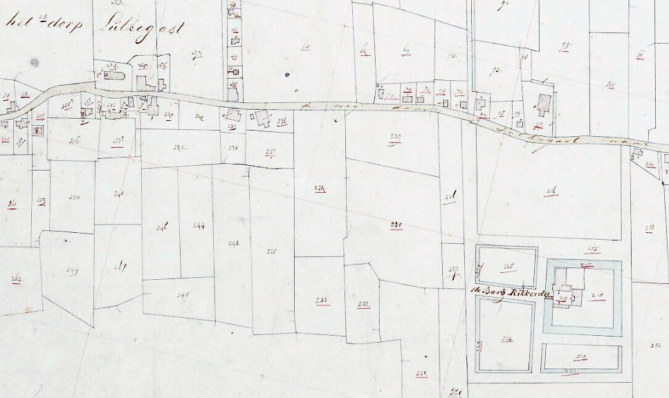 Kadasterkaart Grootegast door H.F. Feringa (1832). Rechts de borg Rikkerda en linksboven Lutjegast met de plaatselijke kerk.